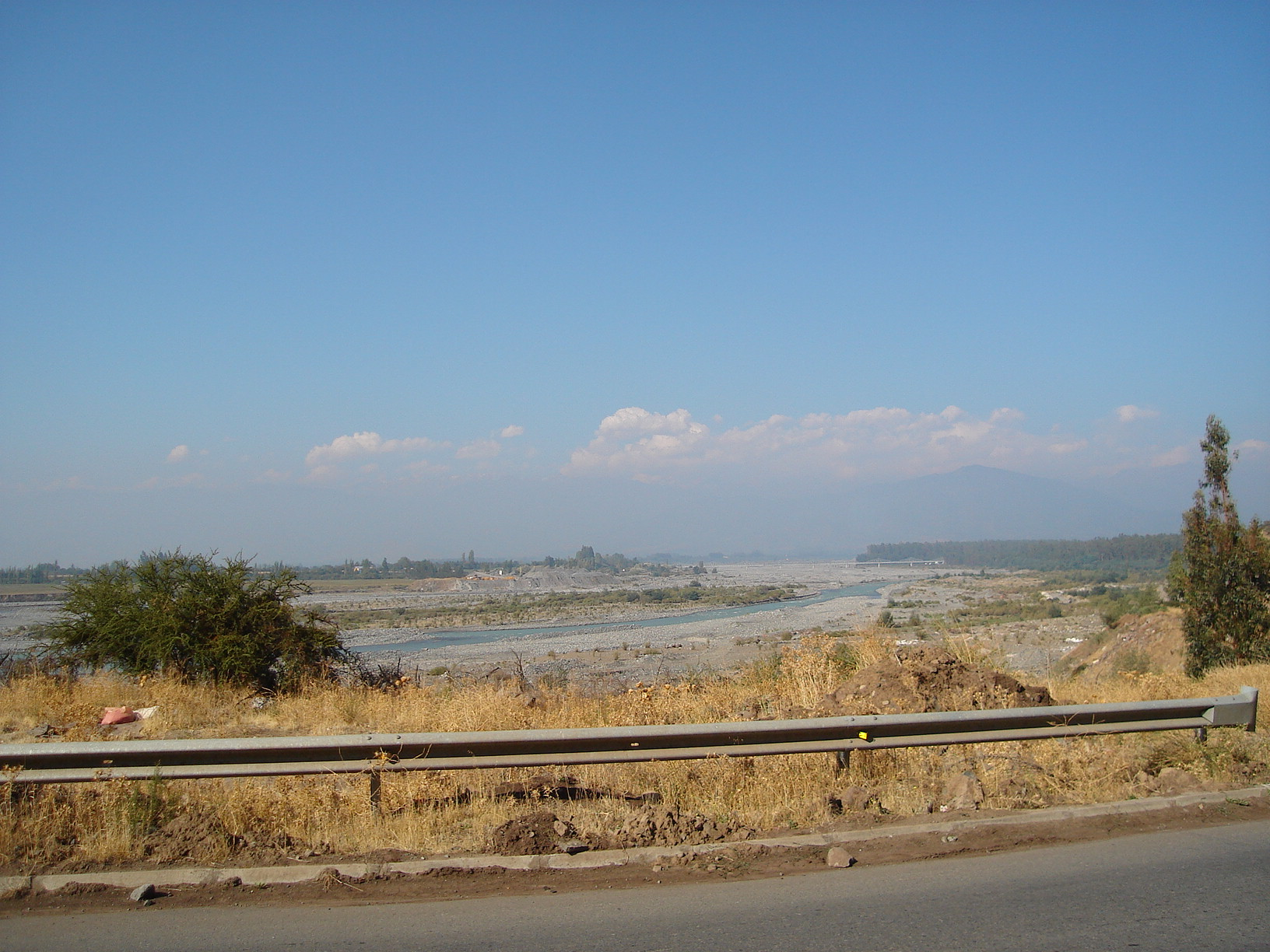 Río Cachapoal desde la Ruta del Ácido. Tomada por Marco Correa (yo) el 1 de abril de 2007.